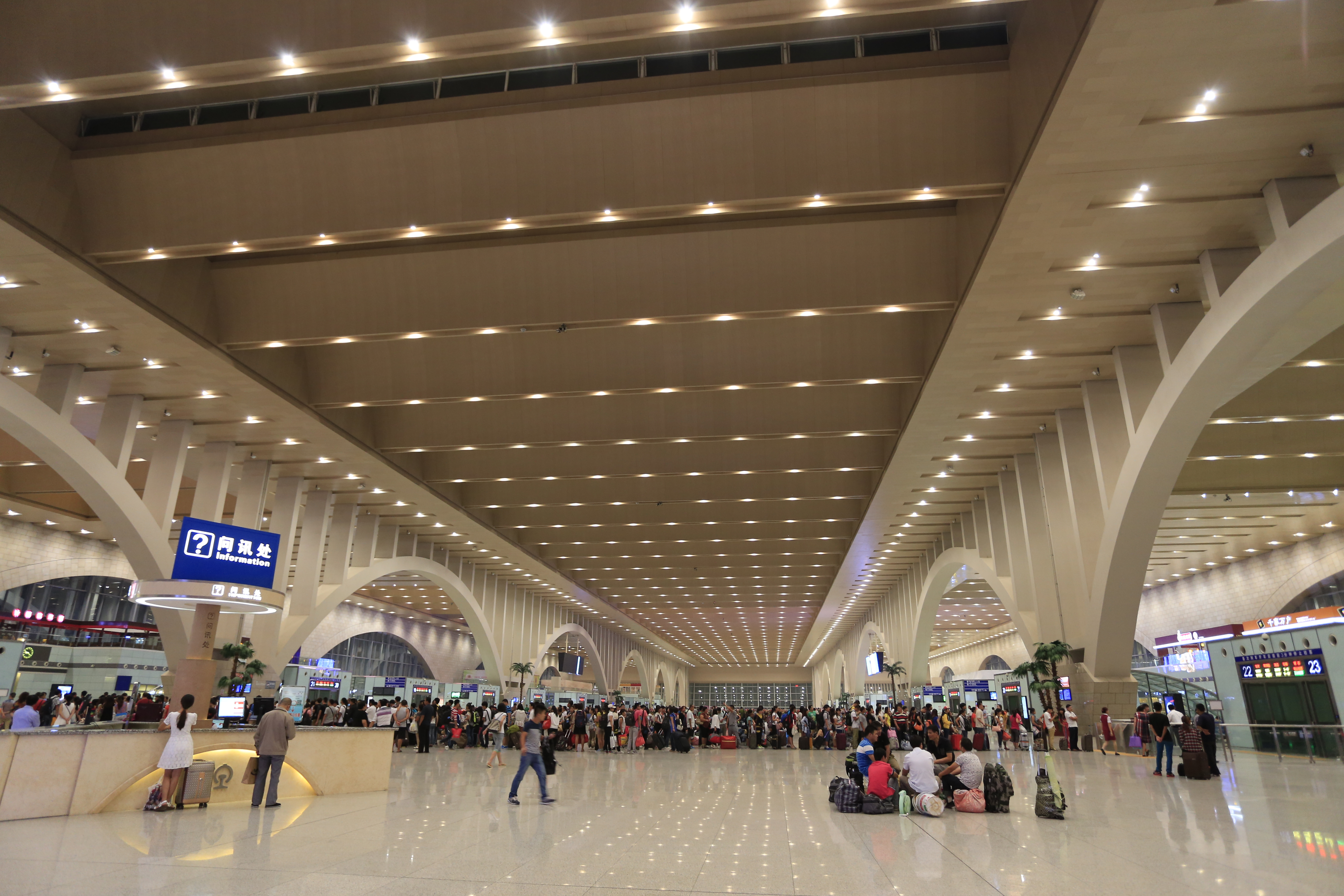 石家庄站